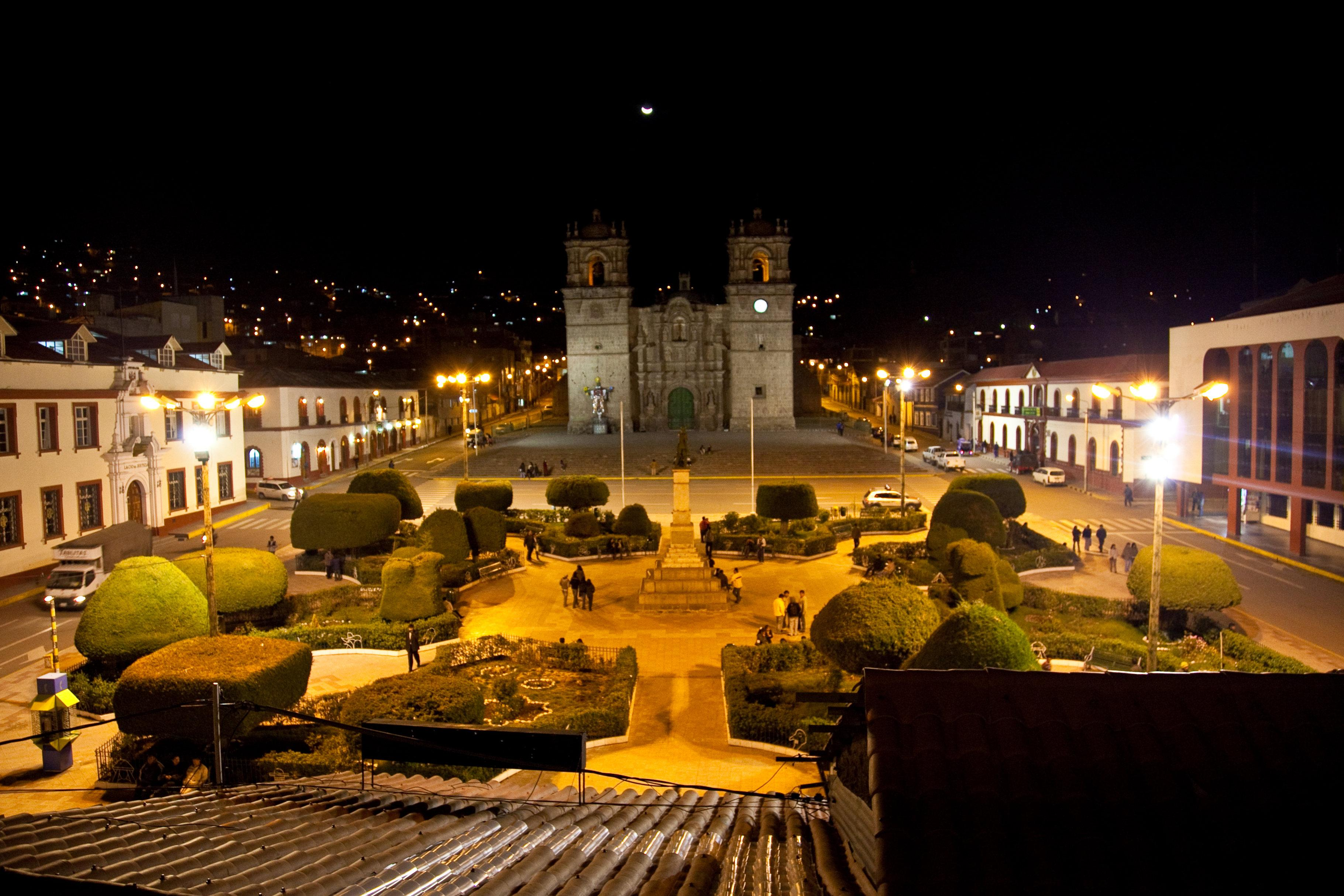 Plaza del Puno — in Puno, the Puno region, southeastern Peru.